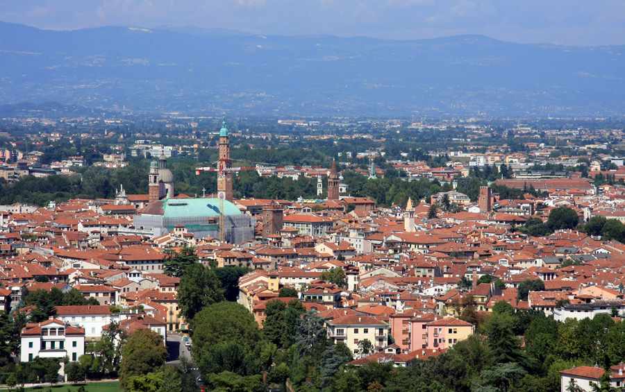 Panorama del centro di Vicenza dal Monte Berico